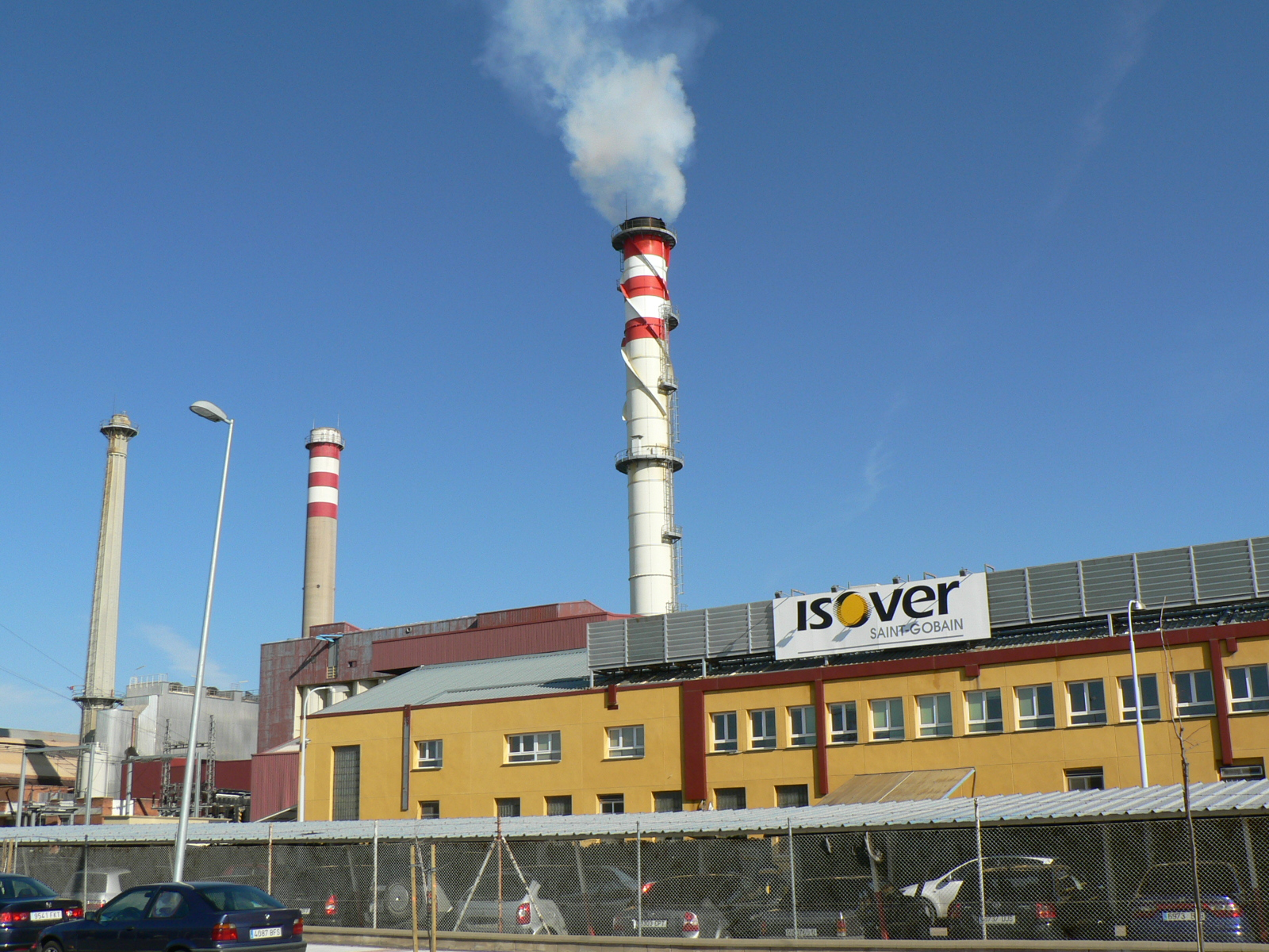 Azuqueca - Zona industrial, fábricas de vidrio.